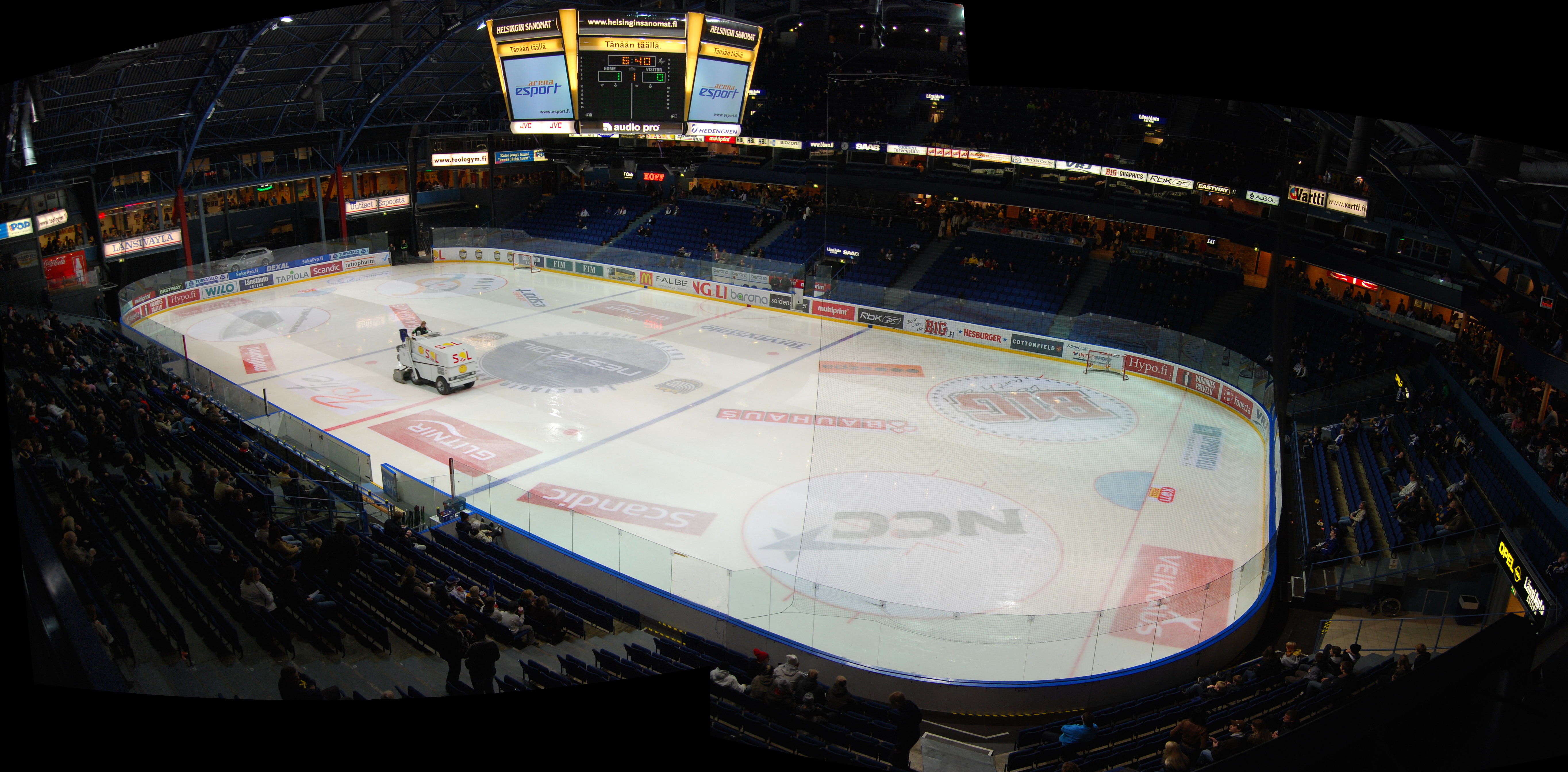 LänsiAuto Areena